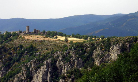 Vue sur La Garde Guérin depuis le GR700